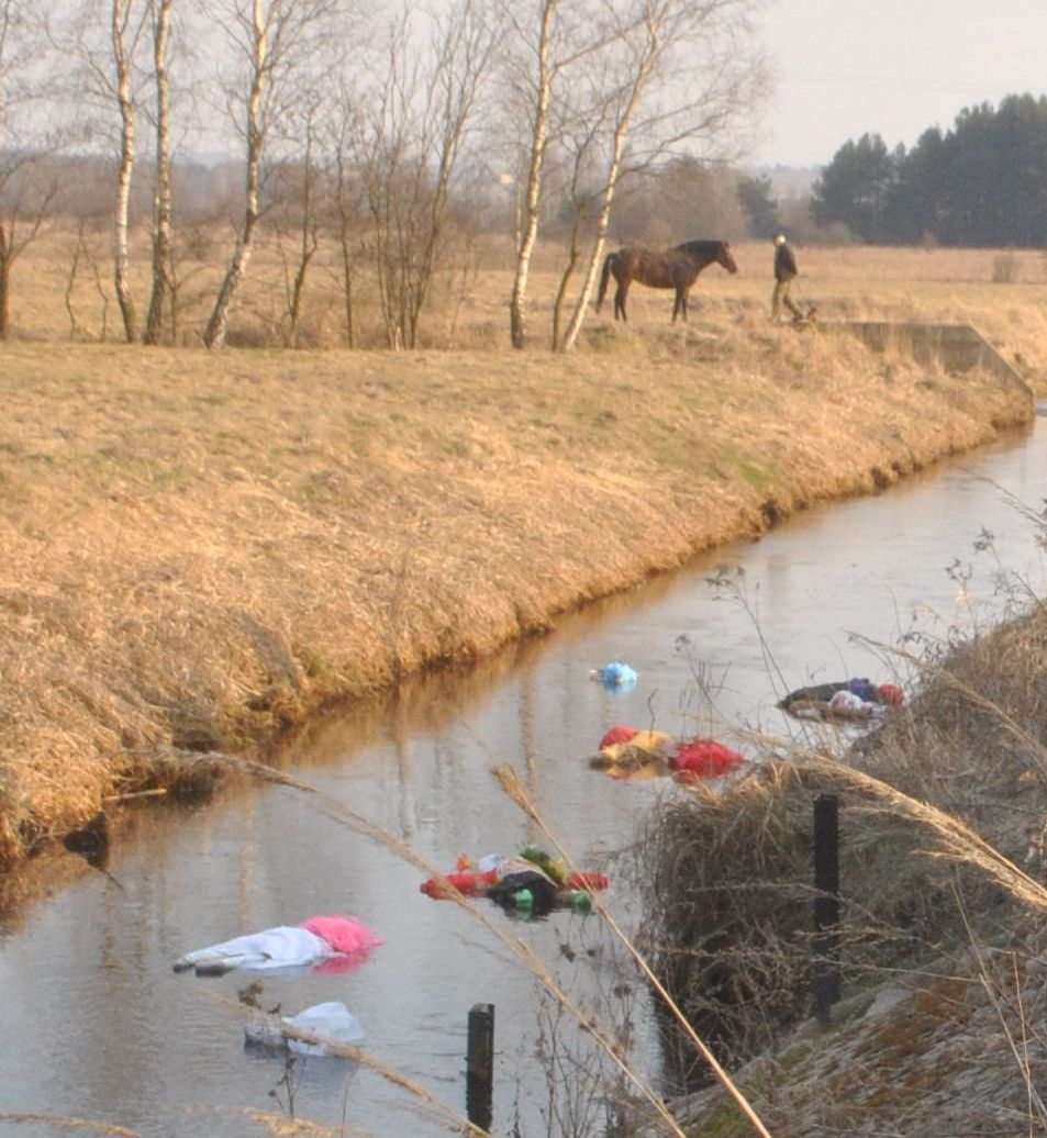 Dzień topienia Marzanny - 21 marca - w Miasteczku Śląskim, 2015.